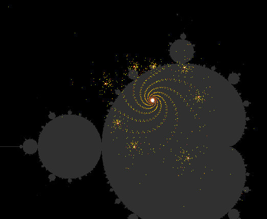 Orbit eines Iterationsverlaufes, mit hinterlegter MBM.